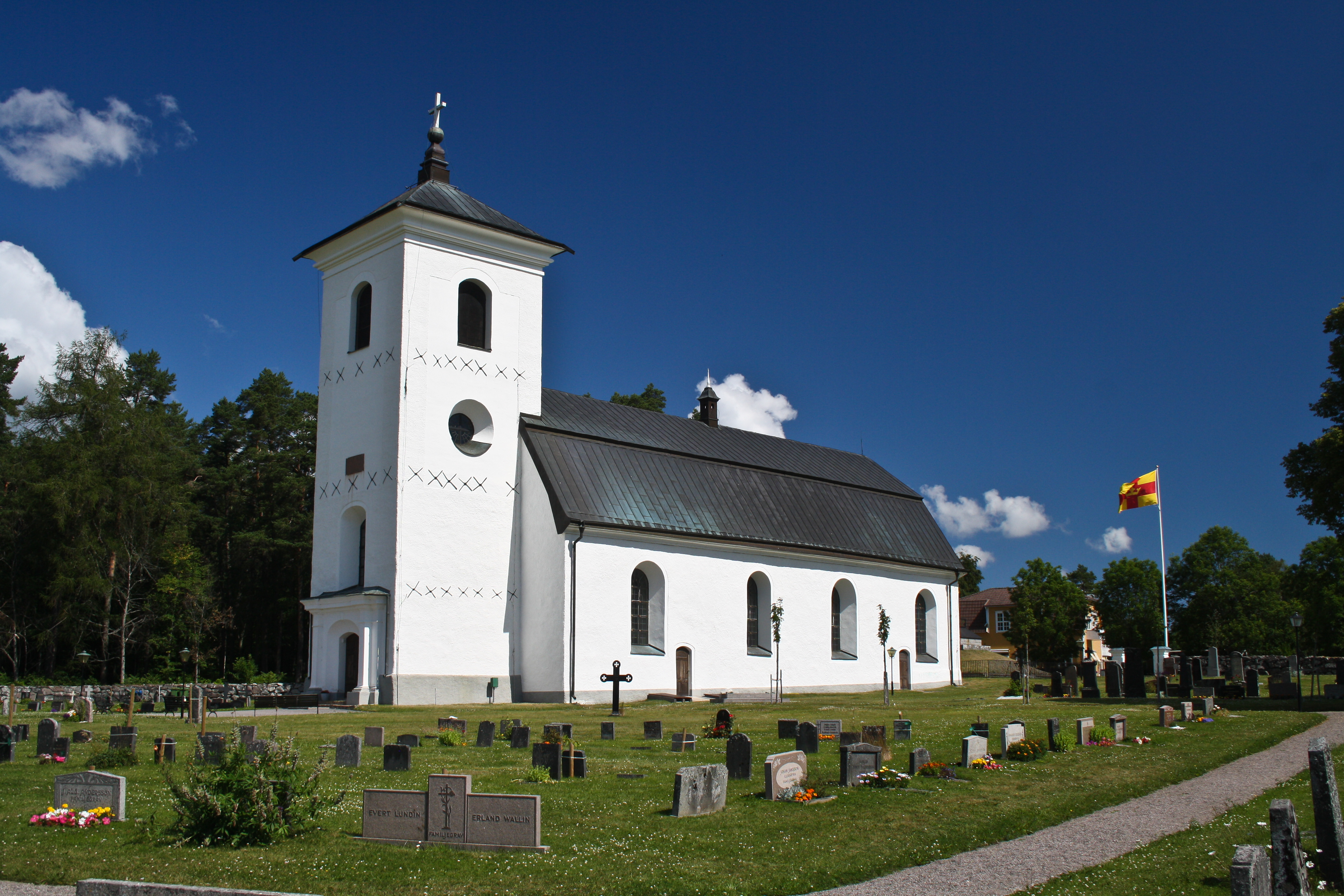 Hargs Kyrka